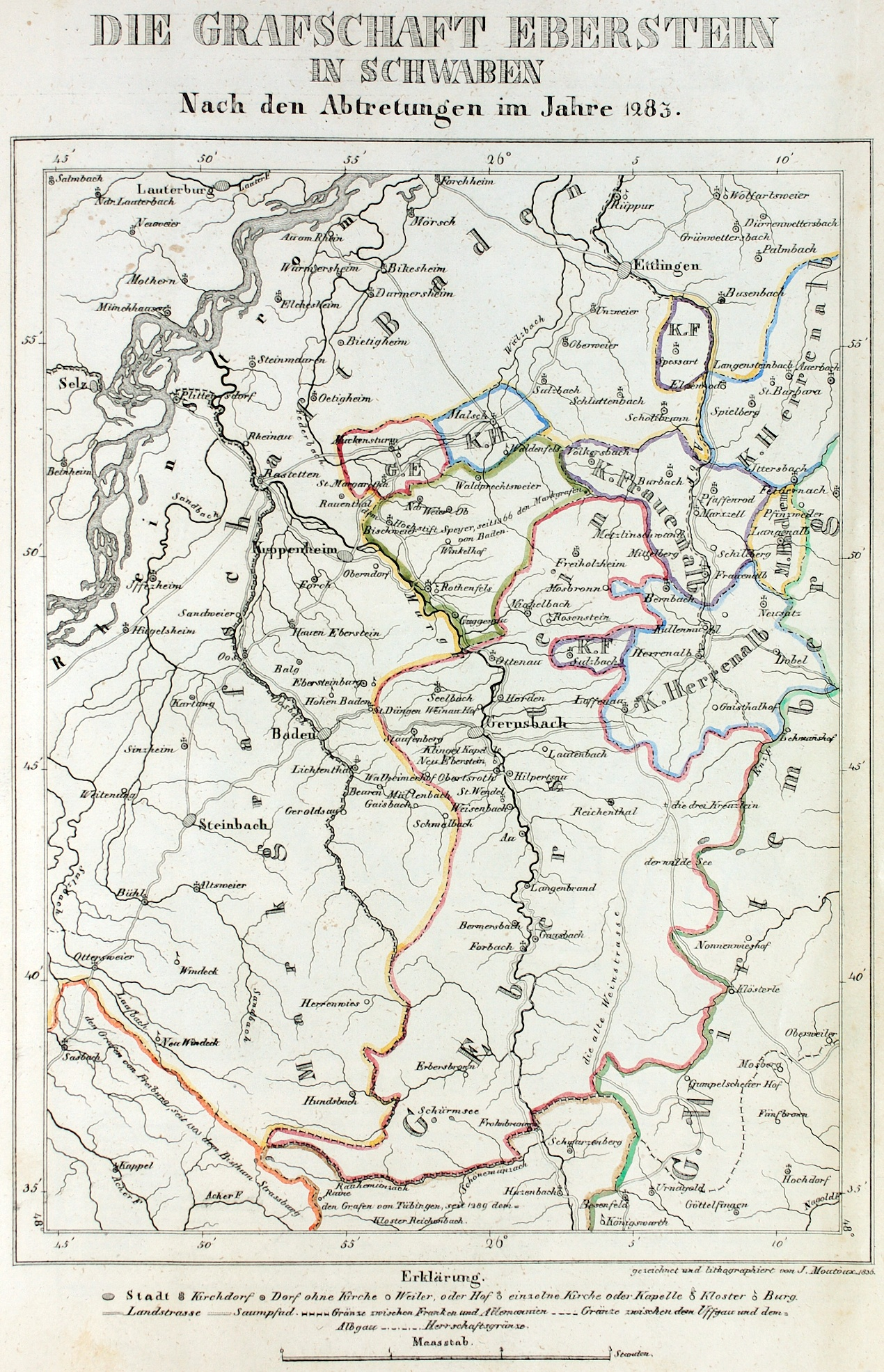 Die Grafschaft Eberstein In Schwaben – Nach den Abtretungen im Jahre 1283